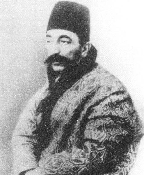 Фотография Султана Али-хана Афхама (1882-1914), премьер-министра Ирана